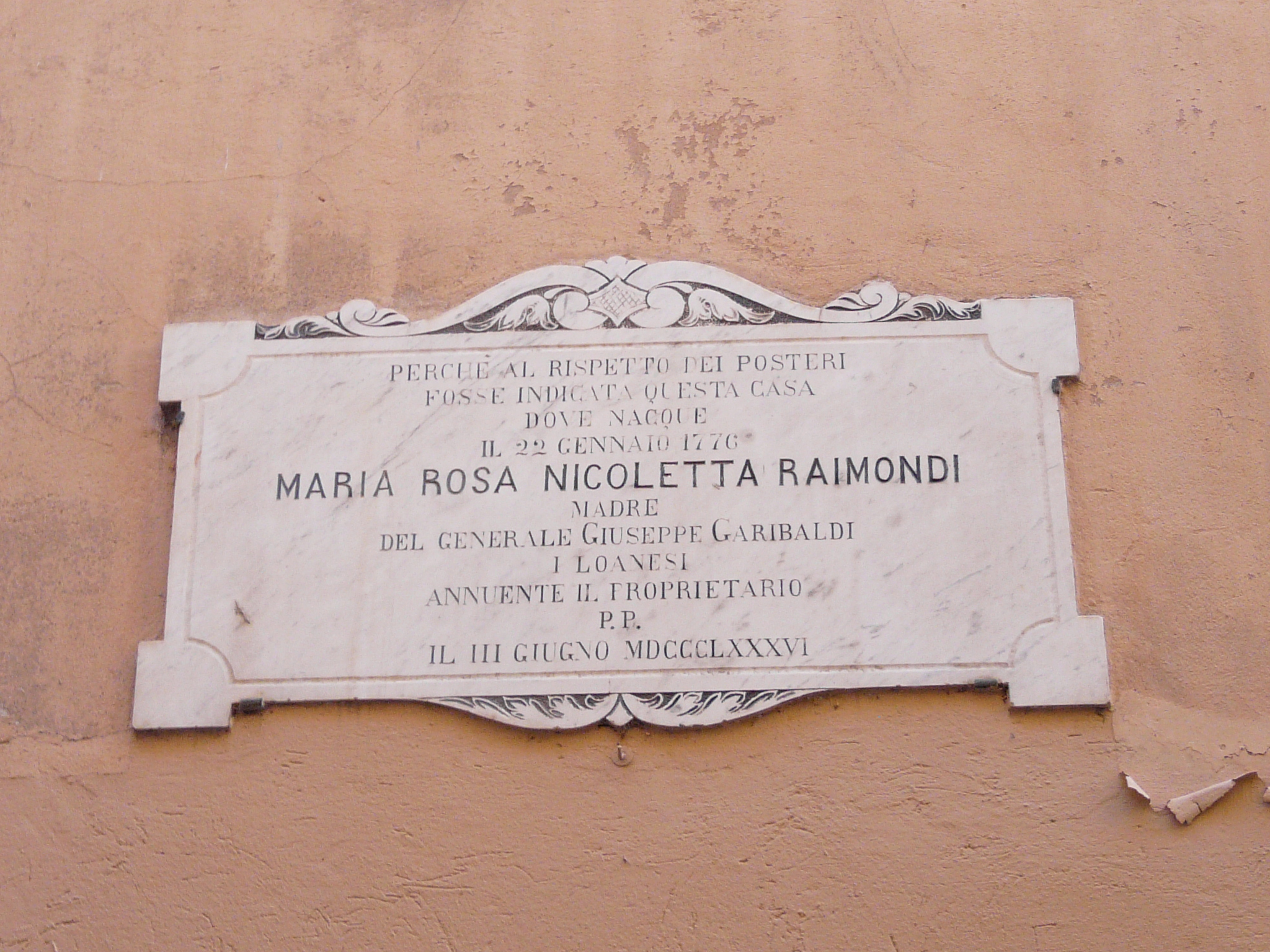 Targa a Maria Rosa Nicoletta Raimondi, madre di Giuseppe Garibaldi, Centro storico di Loano, Liguria, Italia